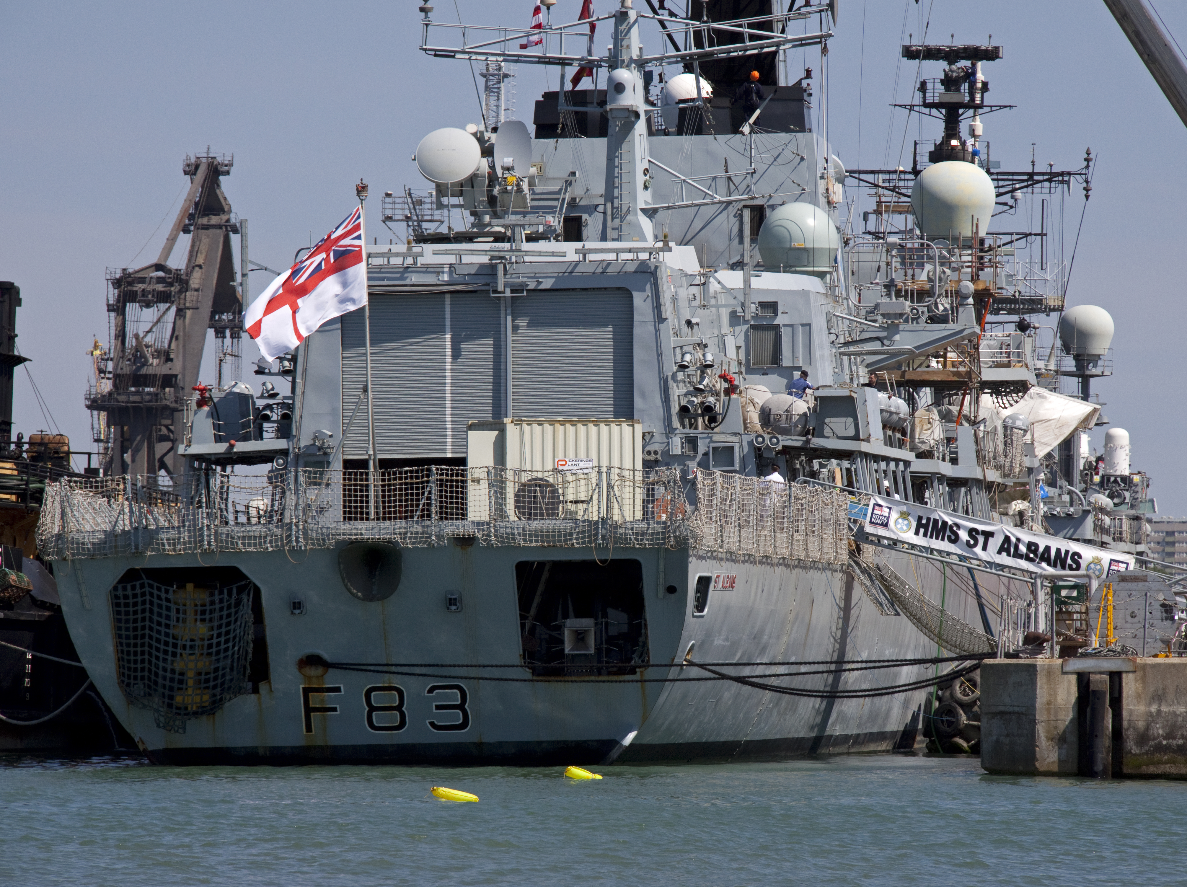 HMS St Albans F83 Stern